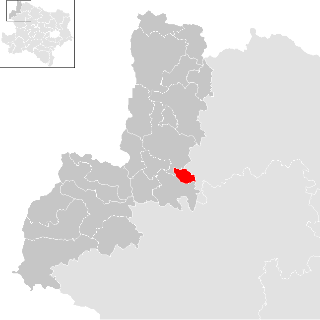 Bezirk Gmünd